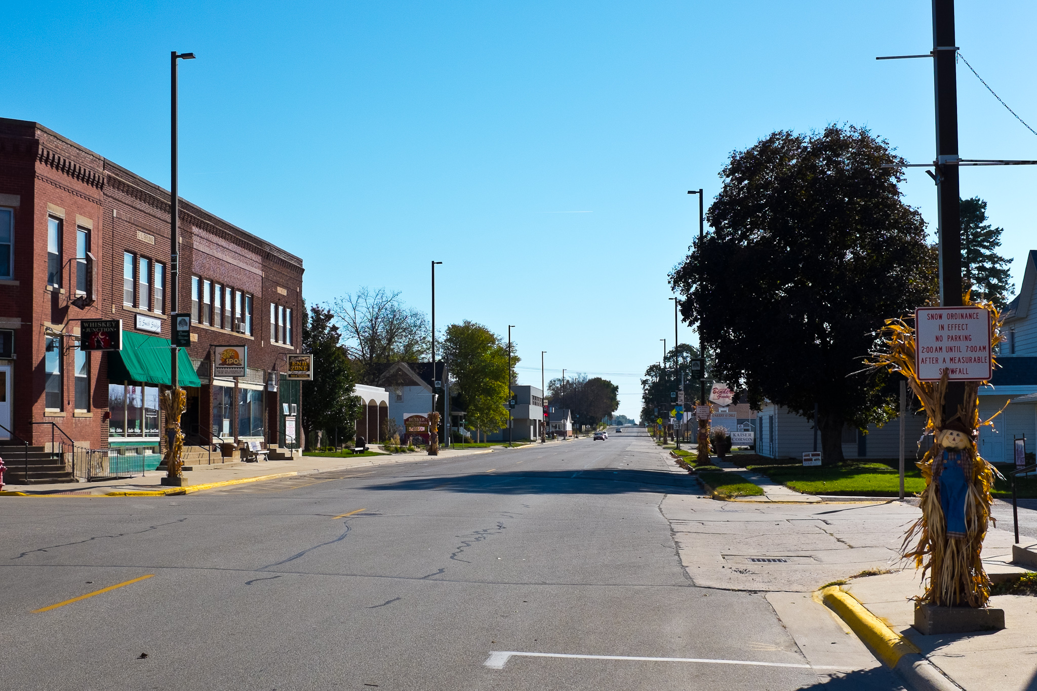 Main Street, Denver, Iowa